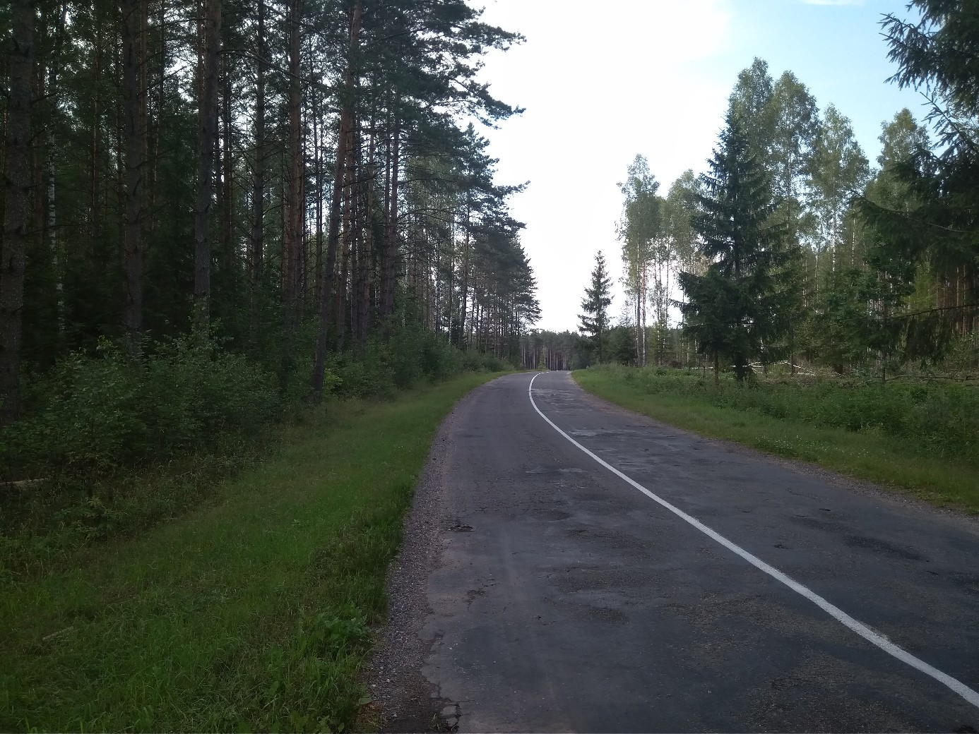 автодорога Полоневичи-Журавинка в Дзержинском районе Минской области